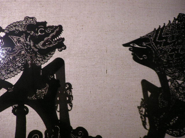 wayang kulit (shadow play) show in Jakarta, Indonesia.